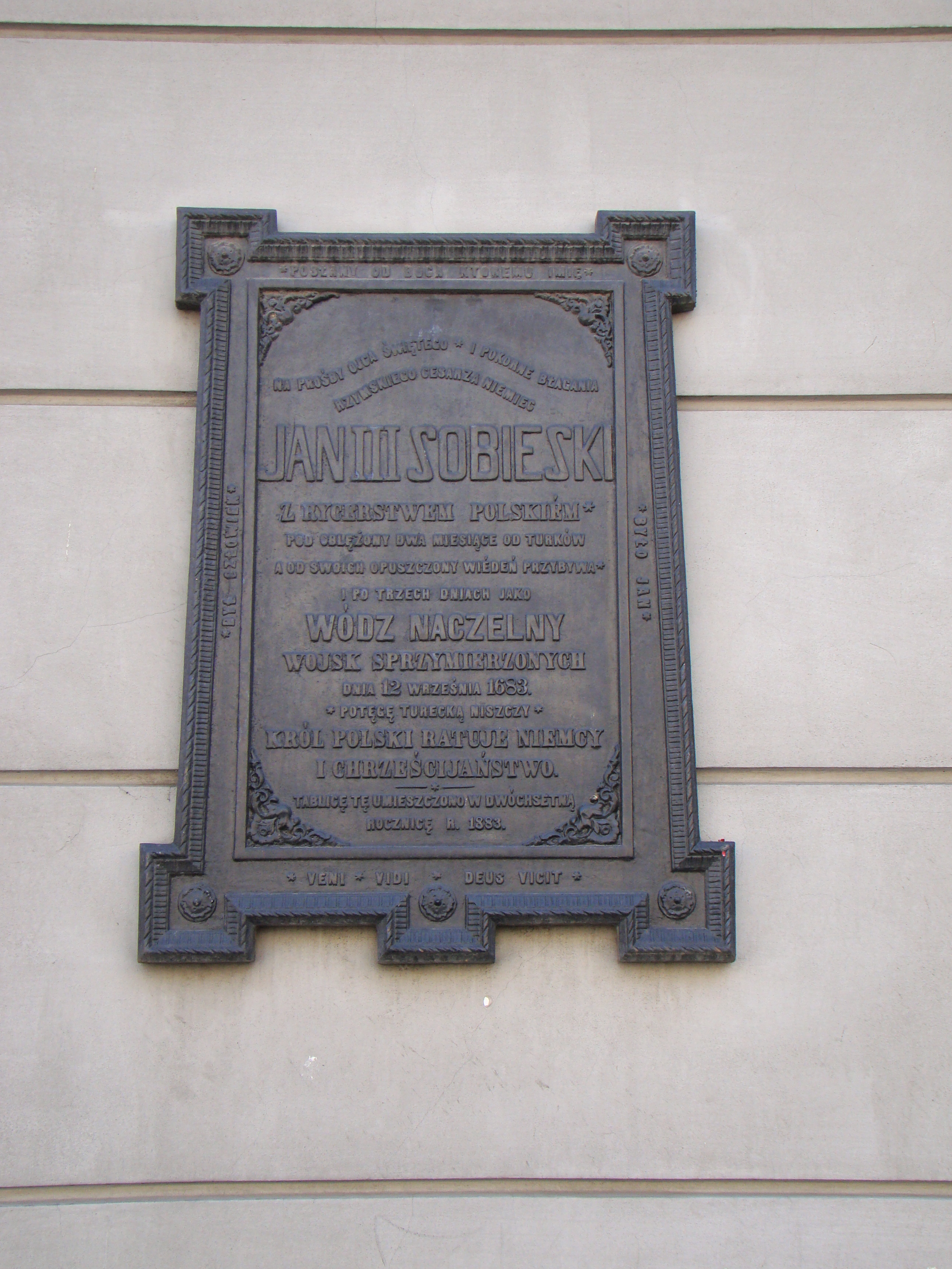 Gliwice, Ratusz z XVIII/XIX wieku, murowany, klasycystyczny, z reliktami z okresu średniowiecza. Granice ochrony obejmują parcelę budowlaną.